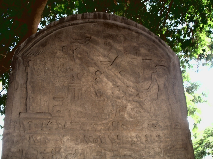 Stèle du pharaon Apriès trouvée dans le temple de Ptah de Memphis - XXVIe dynastie égyptienne